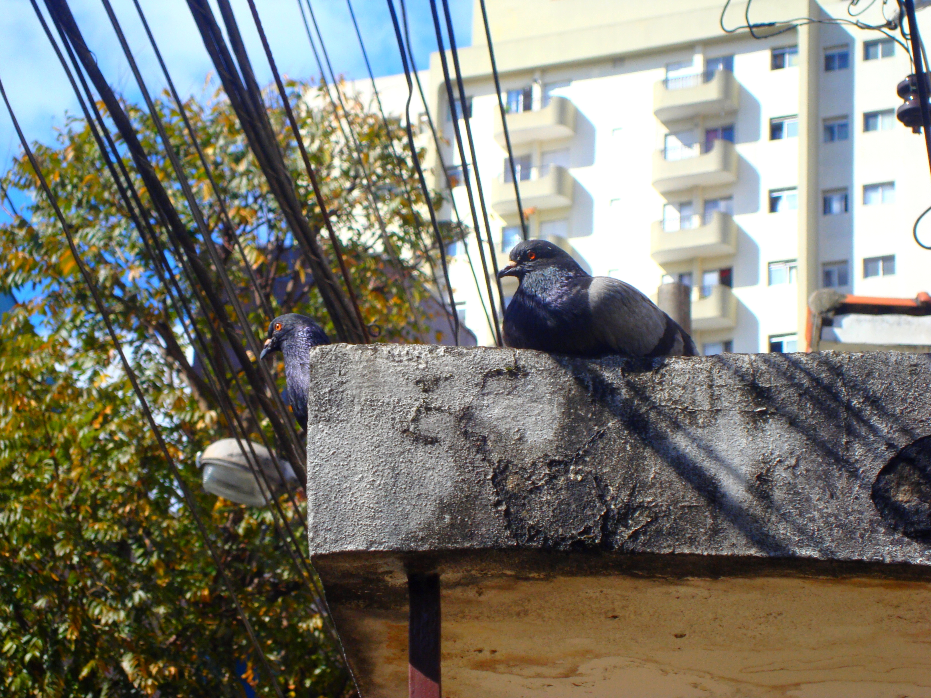 Foto de pombos em uma casa no bairro de santana São Paulo